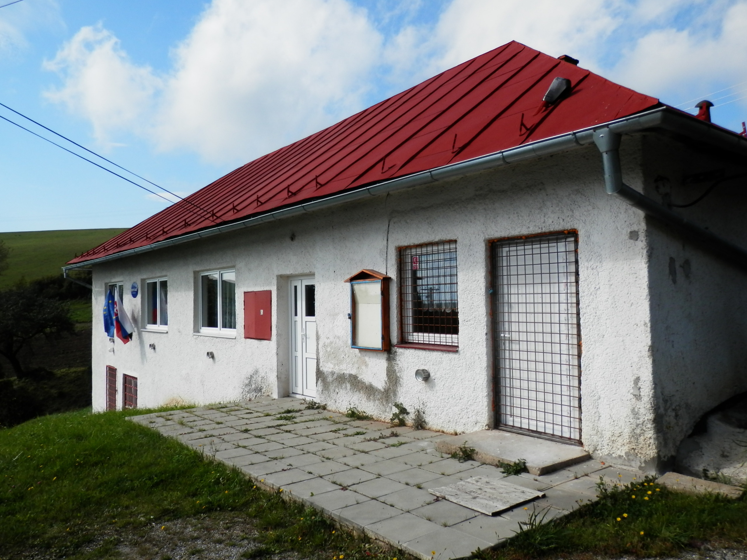 Obecný úrad.Obec Harakovce, okres Levoča.